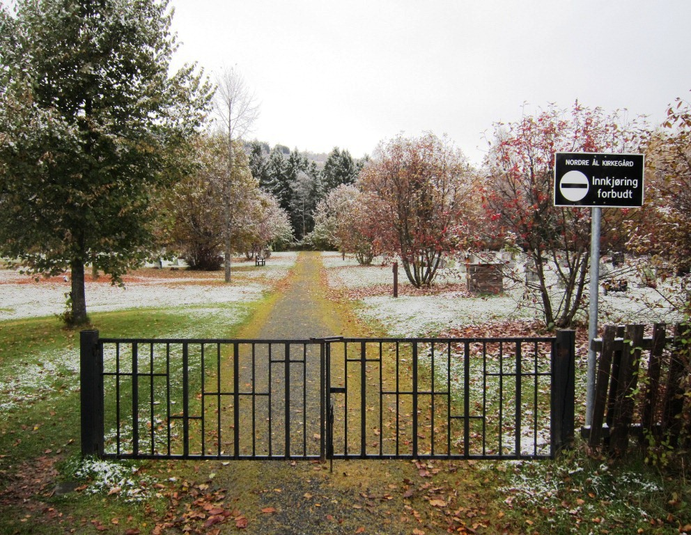 Nordre Ål kirkegård, Lillehammer